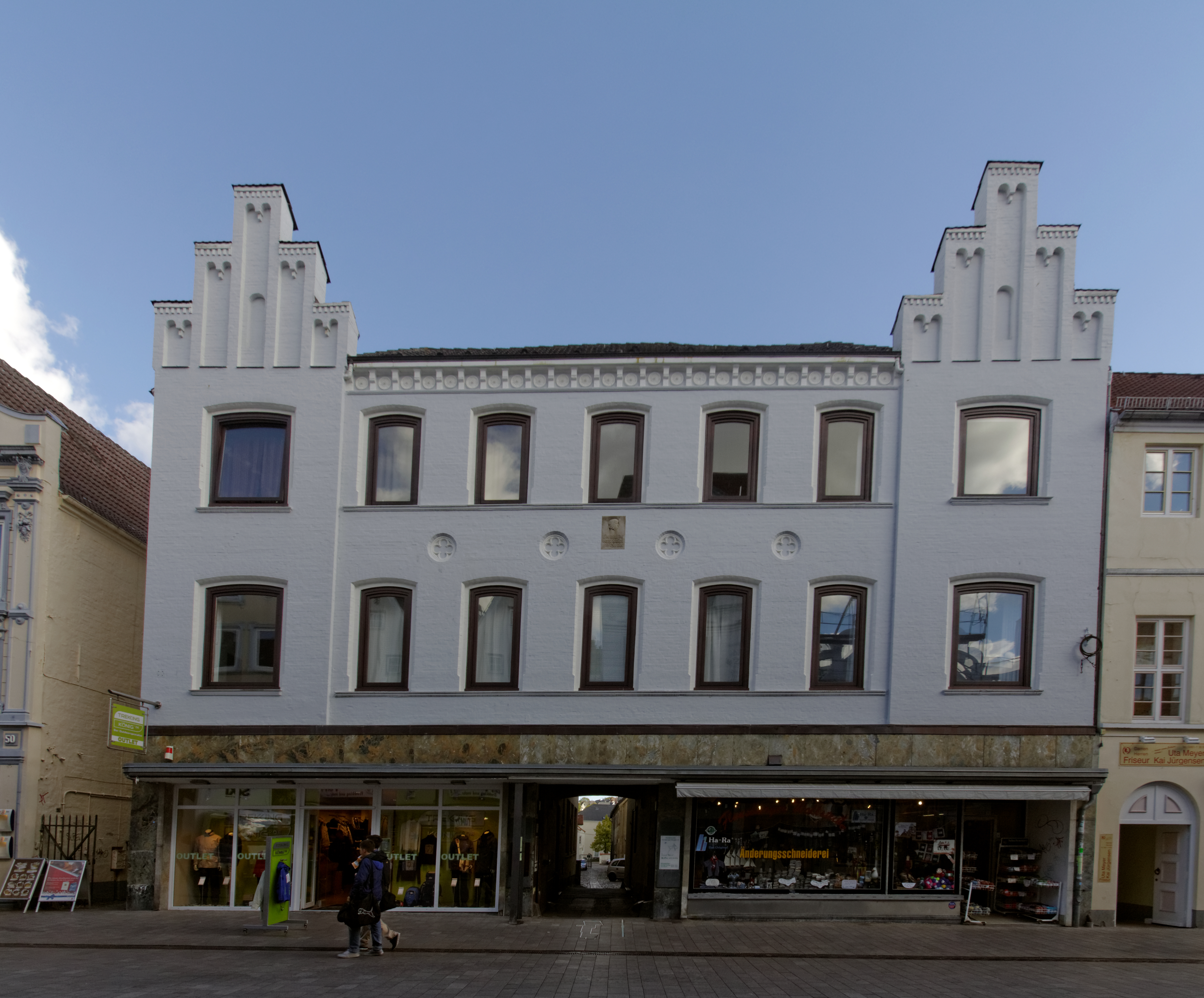 Flensburg, Große Str. 48; Vorderhaus